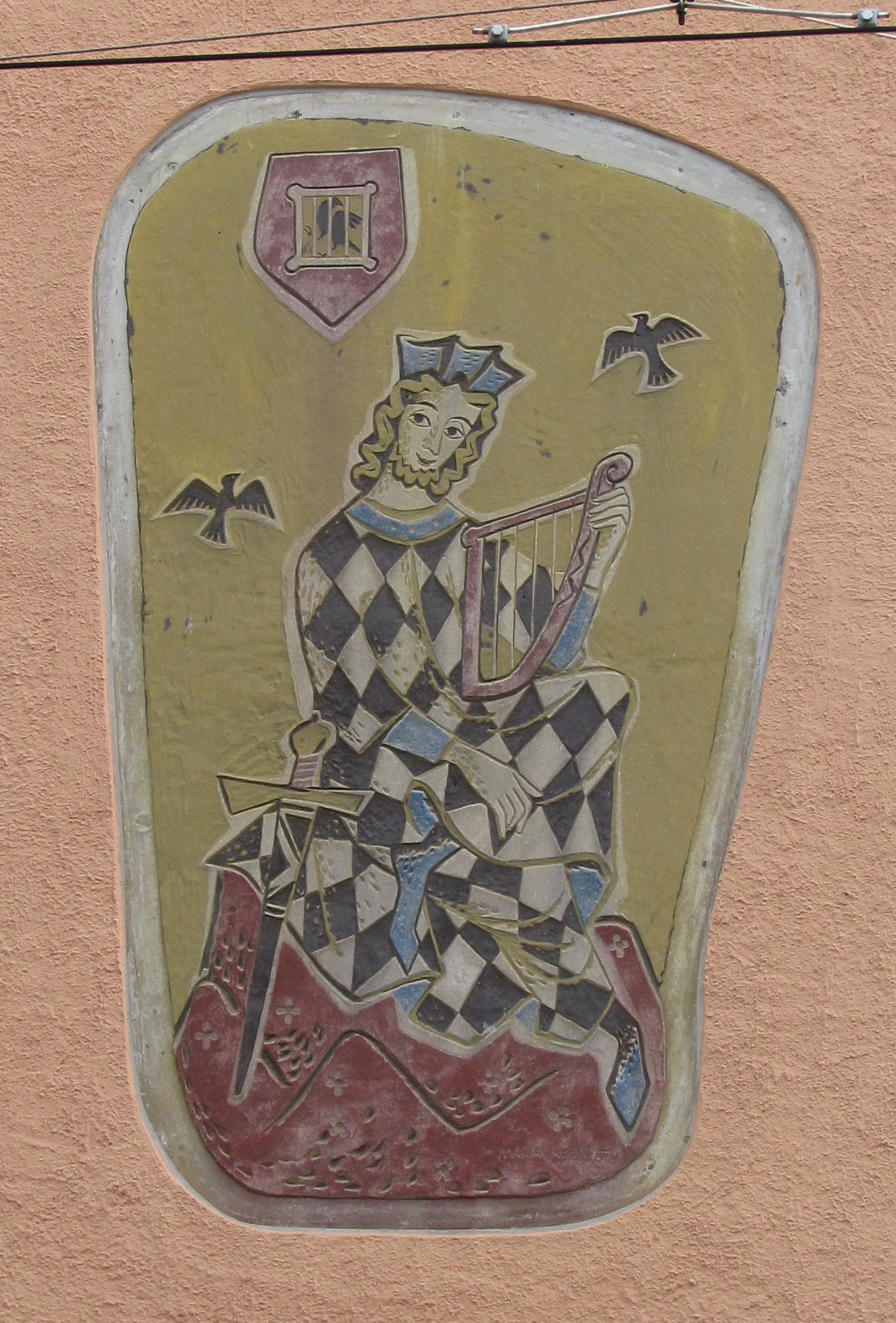 Sgraffito Walther von der Vogelweide von Maria Rehm, 1956, am ehem. Österreichischen Hof, Andreas-Hofer-Straße 47, Innsbruck-Wilten This media shows the remarkable cultural object in the Austrian state of Tyrol listed by the Tyrolean Art Cadastre with the ID 67138. (on tirisMaps, on tirisdienste.at, pdf, more images on Commons)